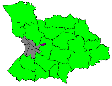 Comunidad La Quinta, ubicada en el Barrio Mayagüez Arriba de Mayagüez, Puerto Rico.